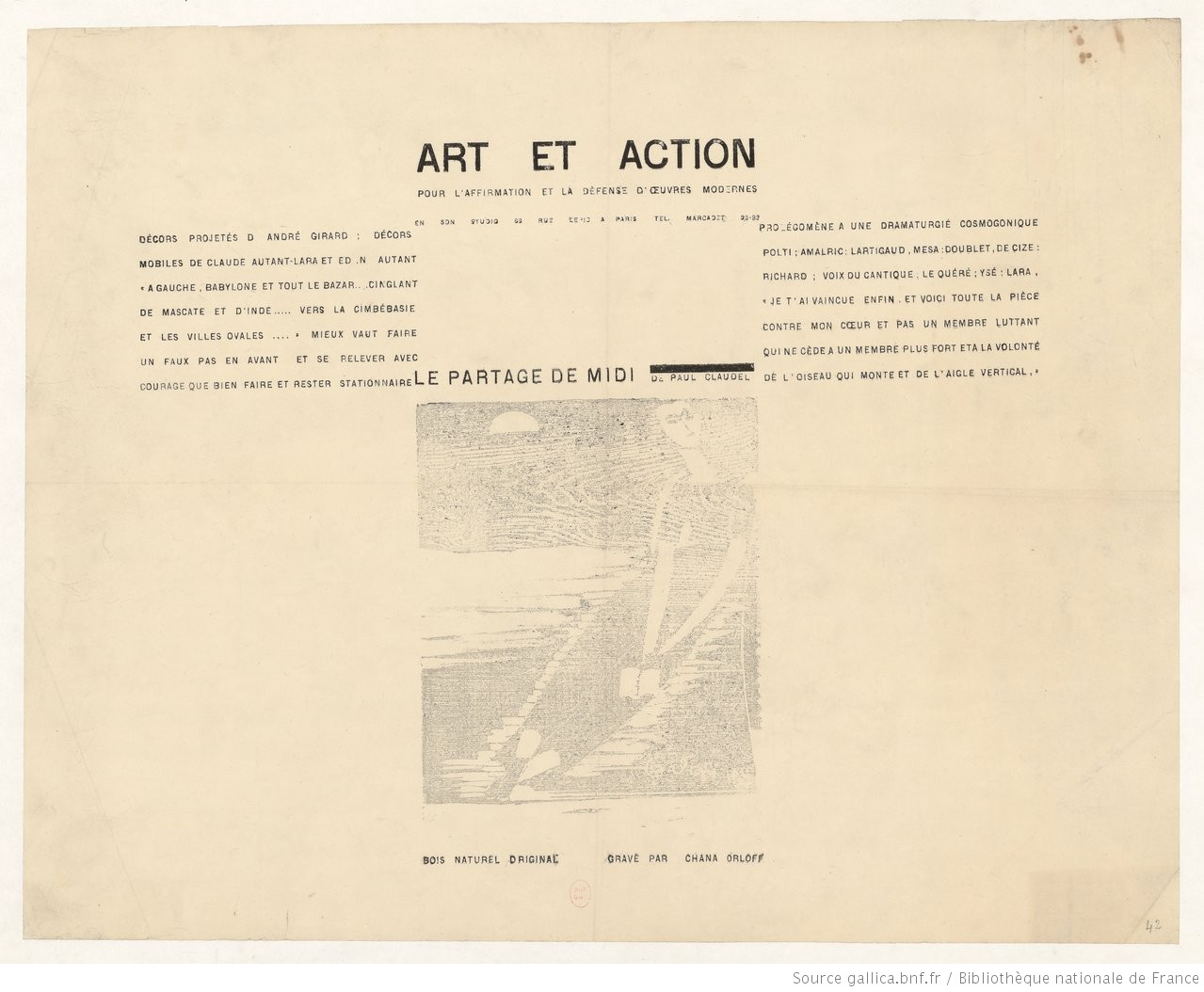 Cette Affiche est une gravure sur bois réalisée par Chana Orloff pour l'édition de "Le partage de midi" en 1921